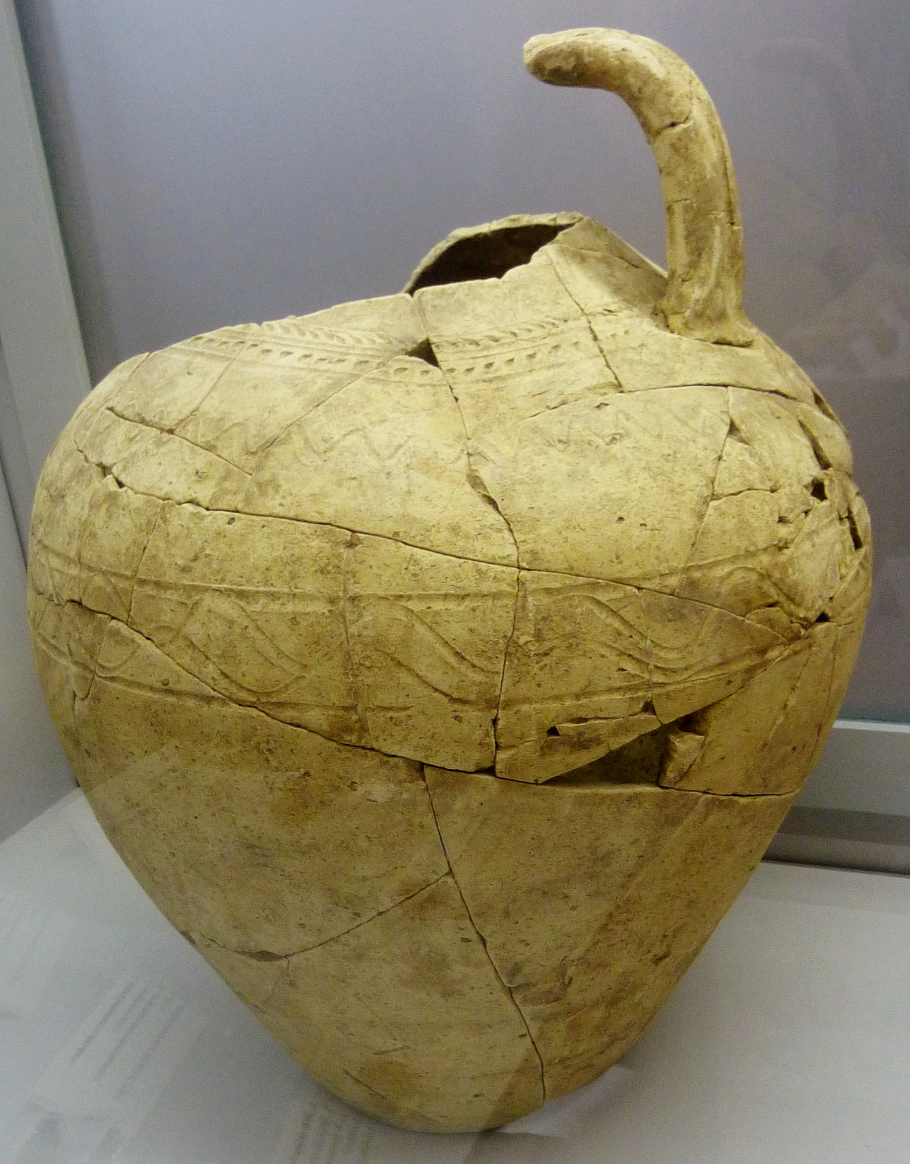 Amphore provenant du site de Valy-Clostre en La Roche-Maurice (terre cuite, 3e ou 4e siècles apr_s J.-C., musée du Léon de Lesneven).